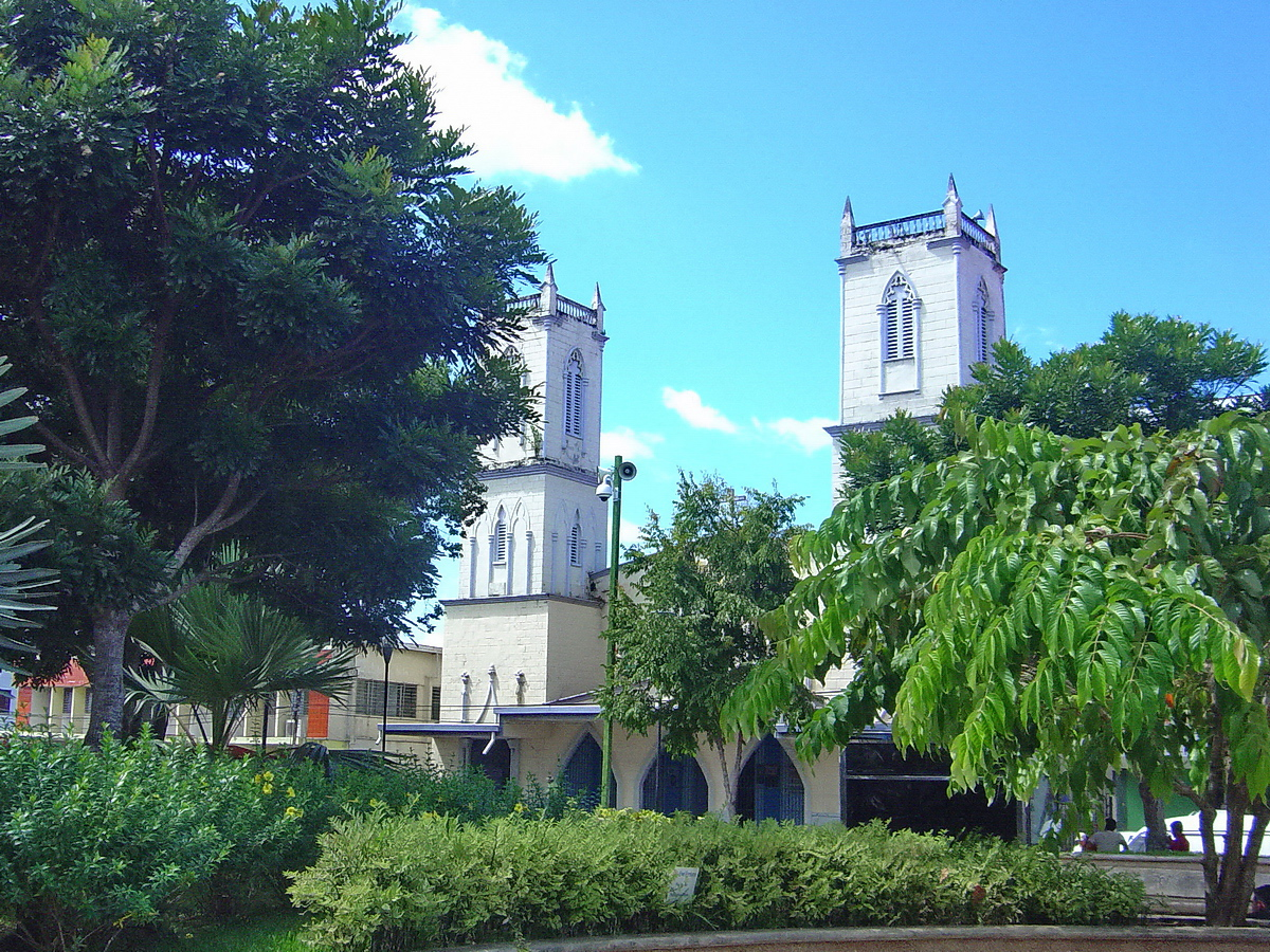 Torres de Catedral de David